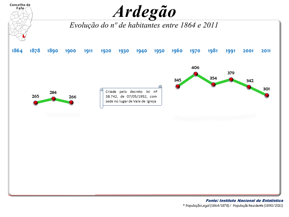 Censos 1864/2011